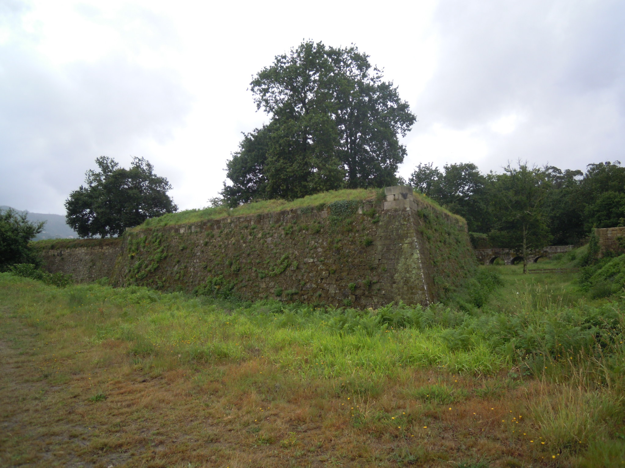 Forte de San Lourenzo, en Goián (Tomiño)